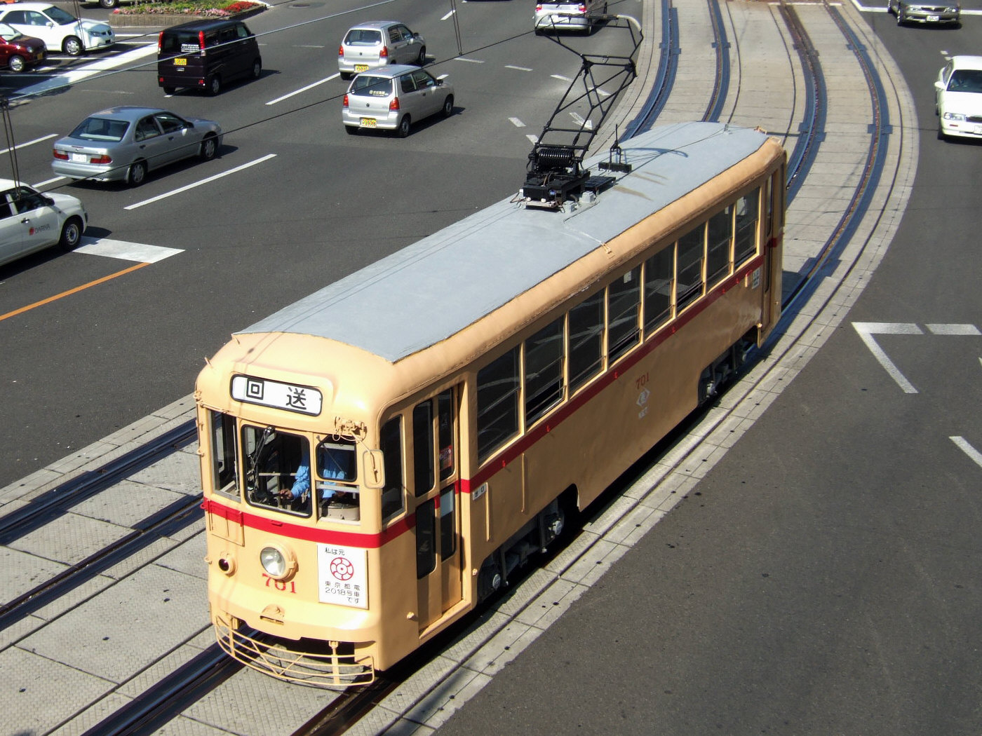 長崎電気軌道700形電車701号（長崎駅前電停付近にて、路面電車サミット記念運転）